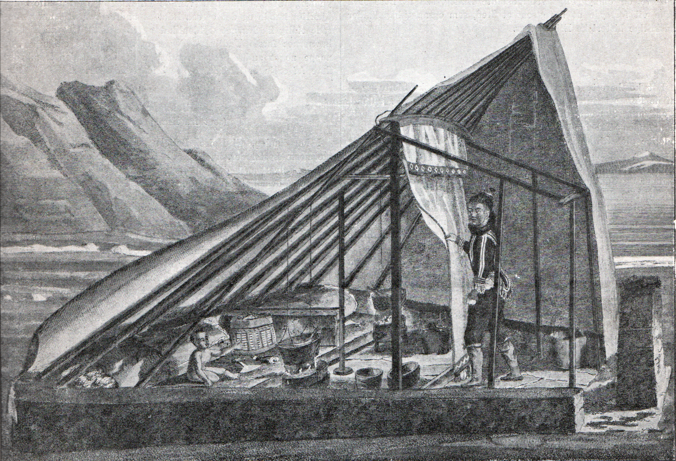 Sommertelt i Østgrønland; Graahs rejse 1828-31